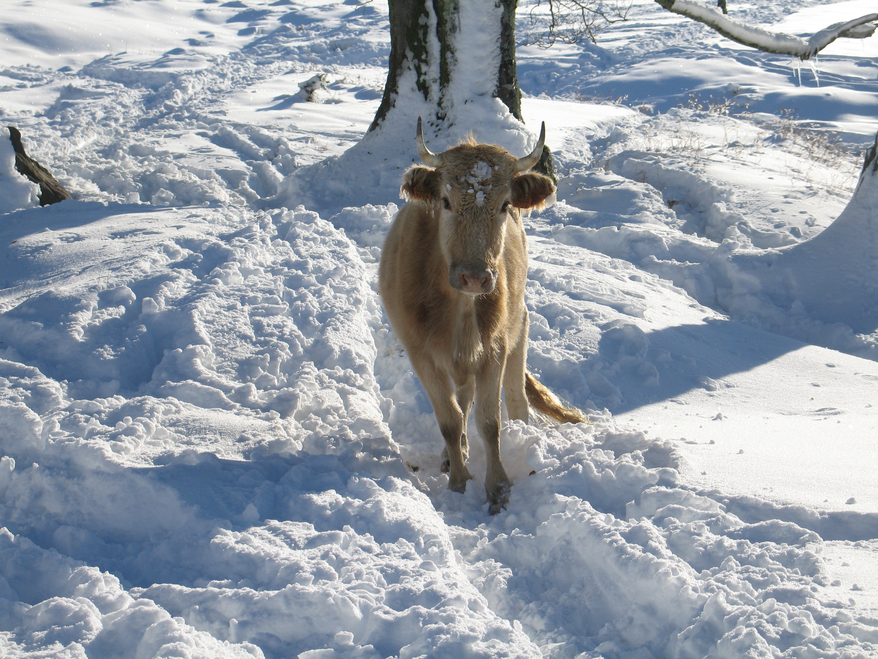 Betizu gazte bat elurretan Elgeako mendilerroan.